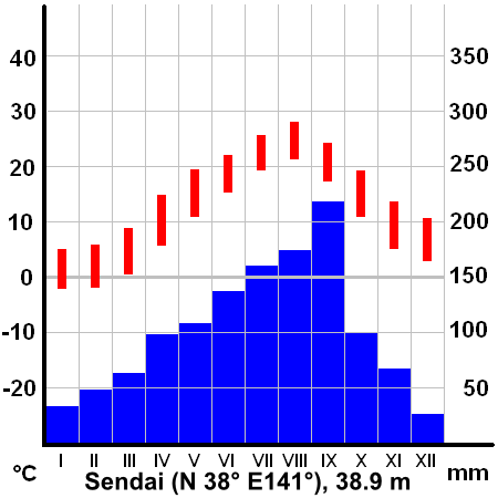 Climate diagram of Sendai, Japan. Map based Image:ClimateTemplate.PNG Source:JMA data